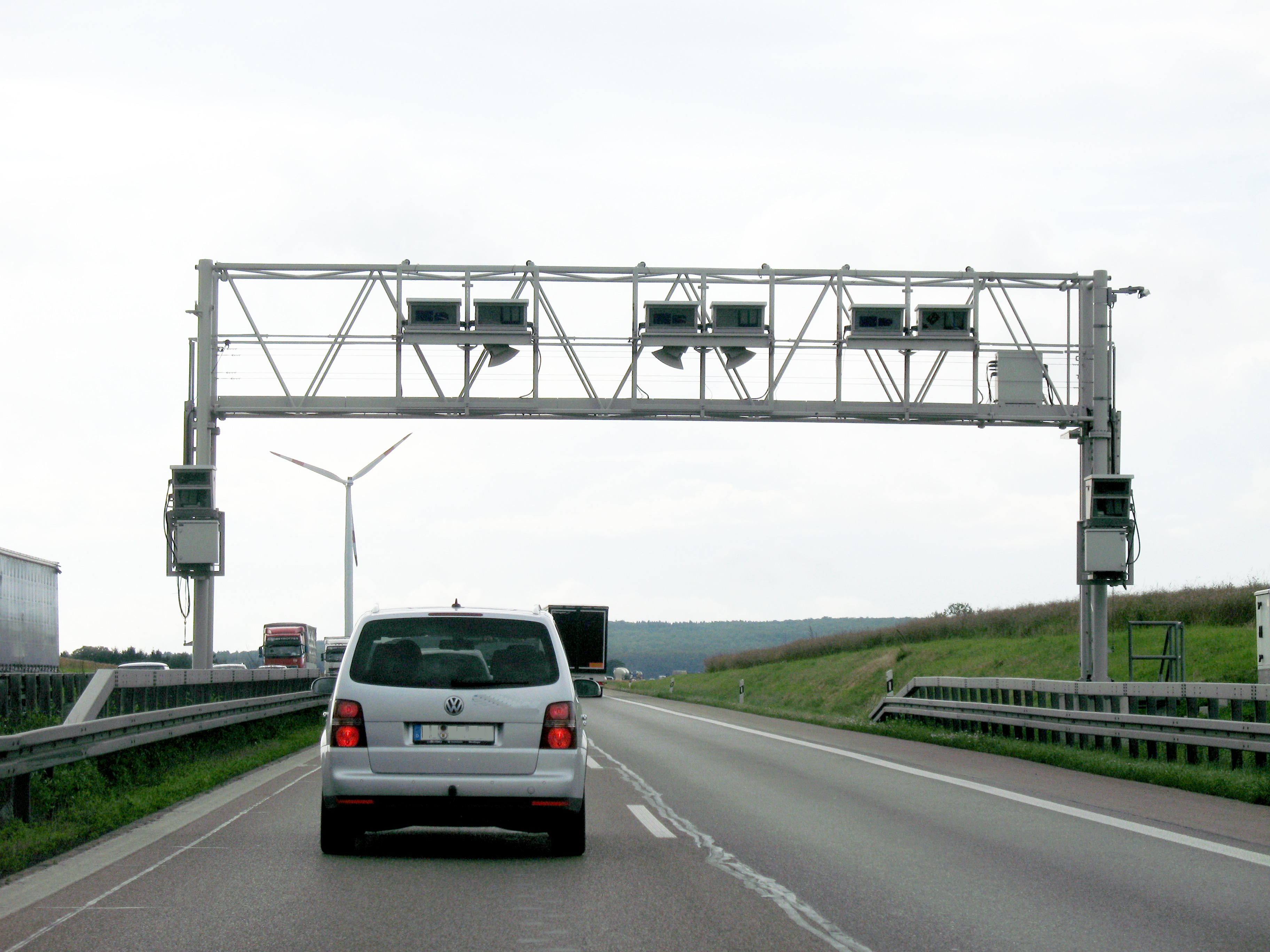 Un portique Toll Collect en Allemagne utilisé pour vérifier le paiement de la taxe autoroutière allemande des camions.